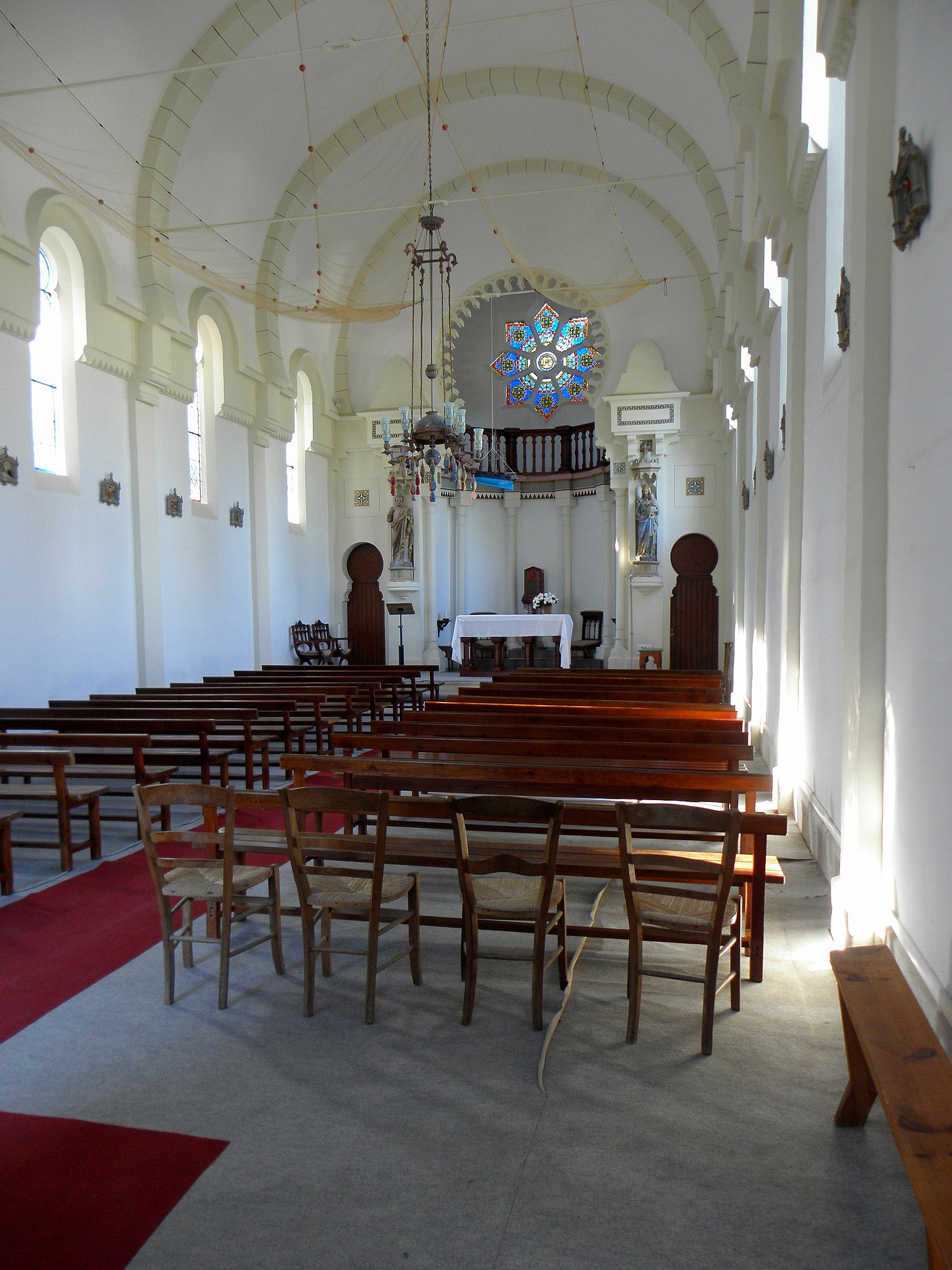 Chapelle Sainte-Marie-du-Cap, chapelle de la Villa Algérienne à Lège-Cap-Ferret (33). Intérieur. Vue vers le chœur.